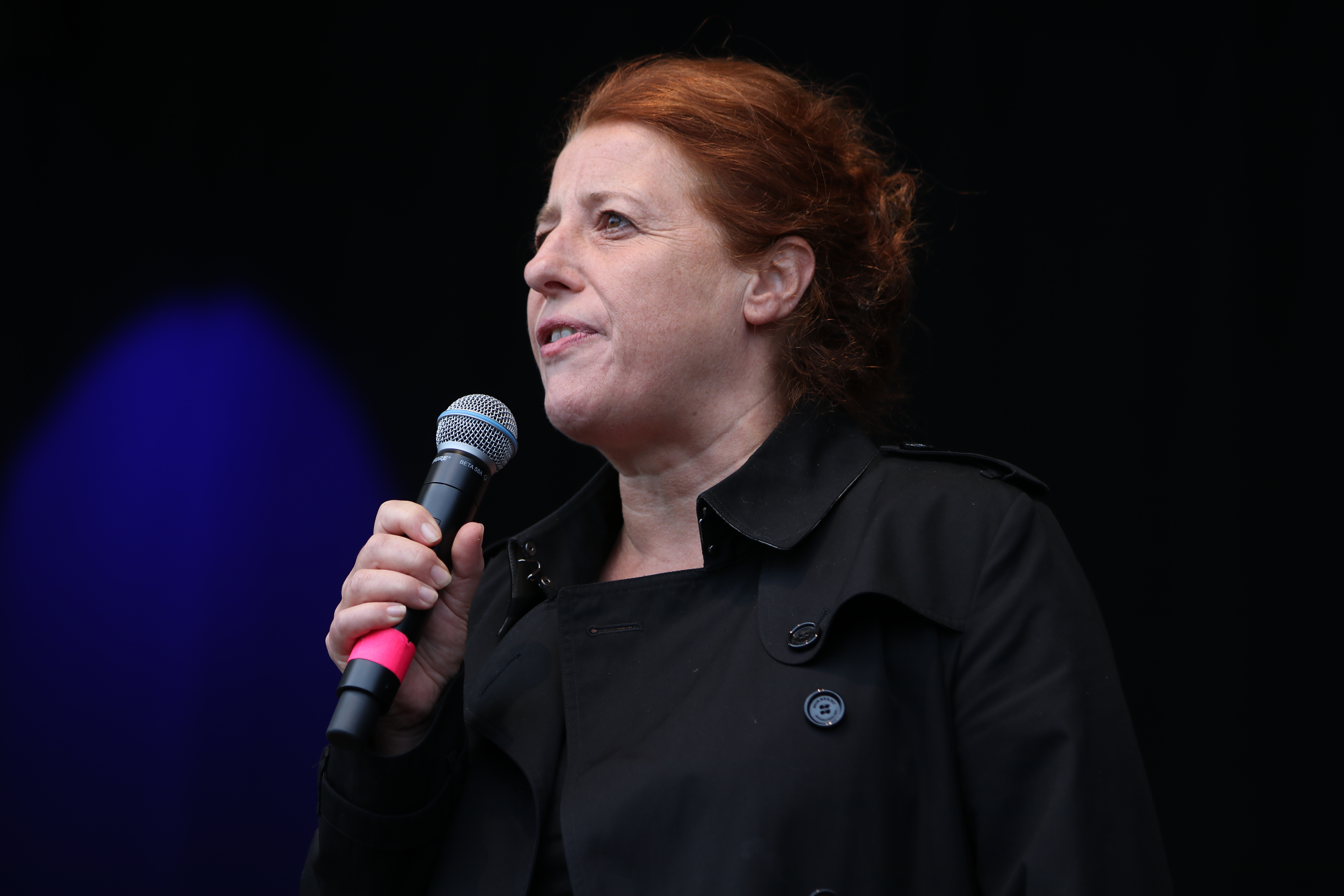 Ausgehetzt, Demonstration in München am 22. Juli 2018 gegen den Rechtsruck in der bayerischen Politik